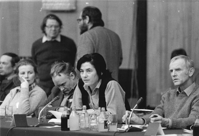 ADN-ZB Senft 29.12.1981 Berlin: An der "Berliner Begegnung zur Friedensförderung" von Schriftsteller, Künstlern und Wissenschaftlern, aus europäischen Ländern vom 13. bis 14. Dezember 1981, nahmen Christa Wolf und Günter de Bruyn (r.) teil.